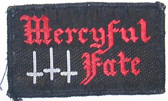 Sticker mit Mercyful Fate Logo aus dem Jahr 1983